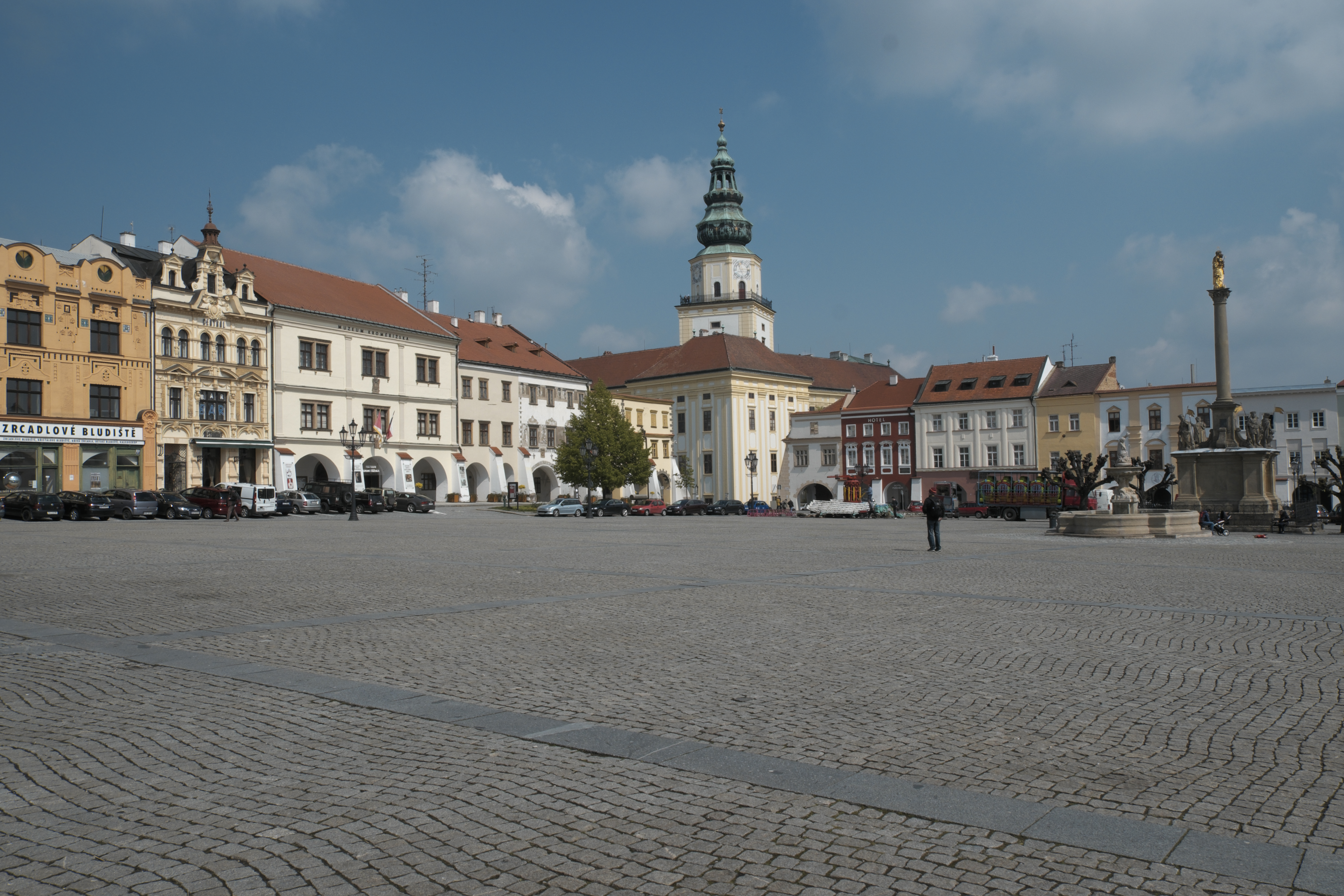 Marktplatz in Kroměříž in der Region Zlin in Tschechien